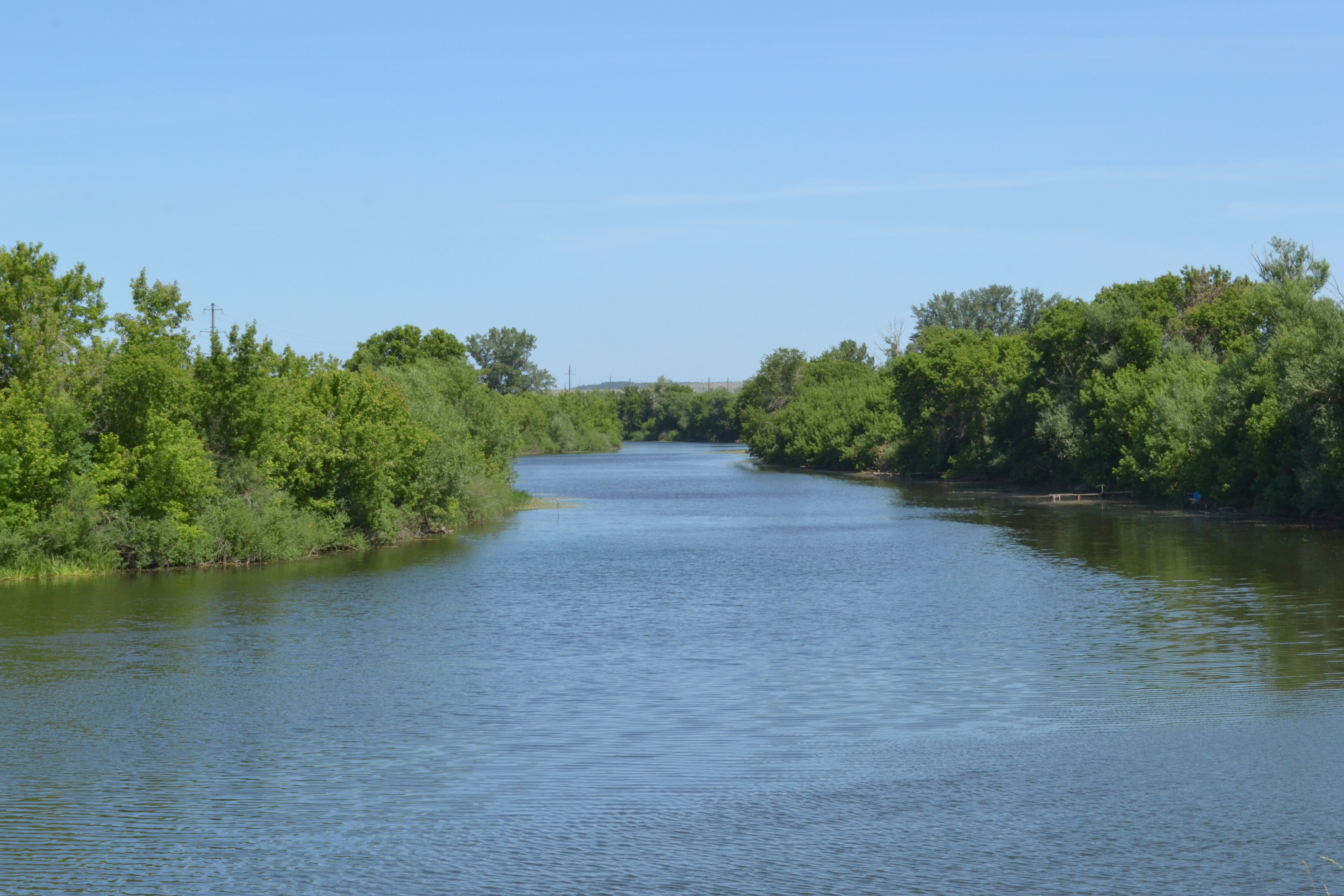 Чаган у Соболева